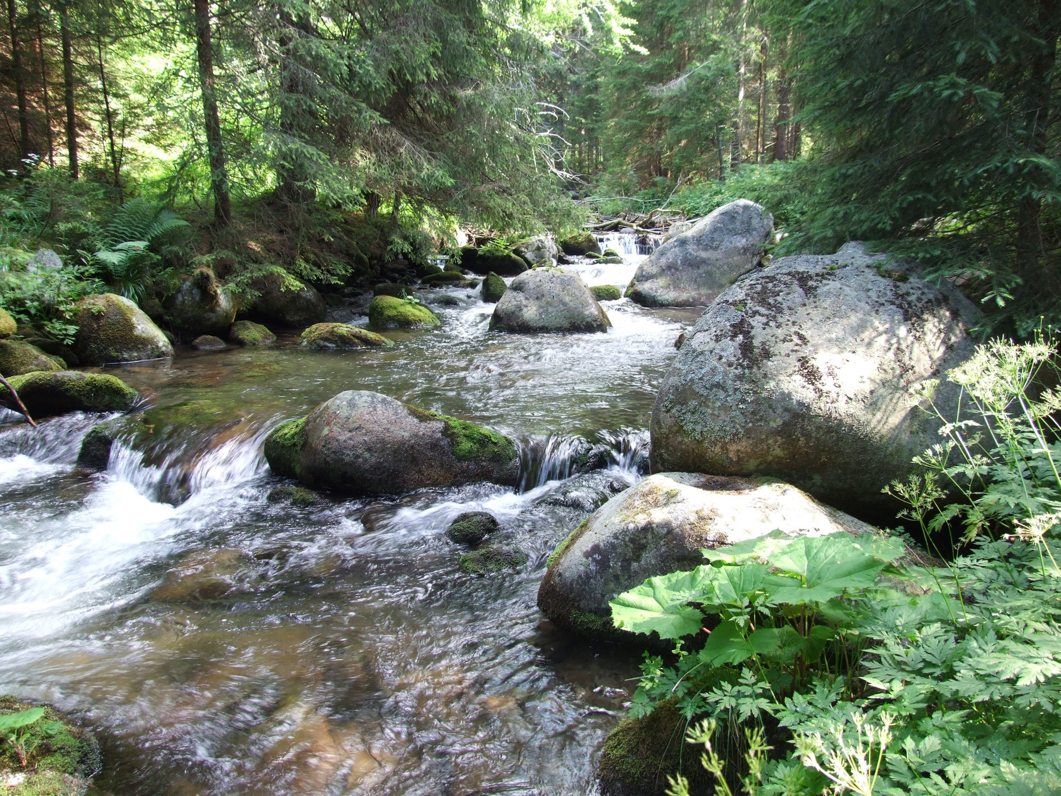 Potok Smreczanka (Smrečianka) w Dolinie Zarskiej (Tatry Zachodnie)